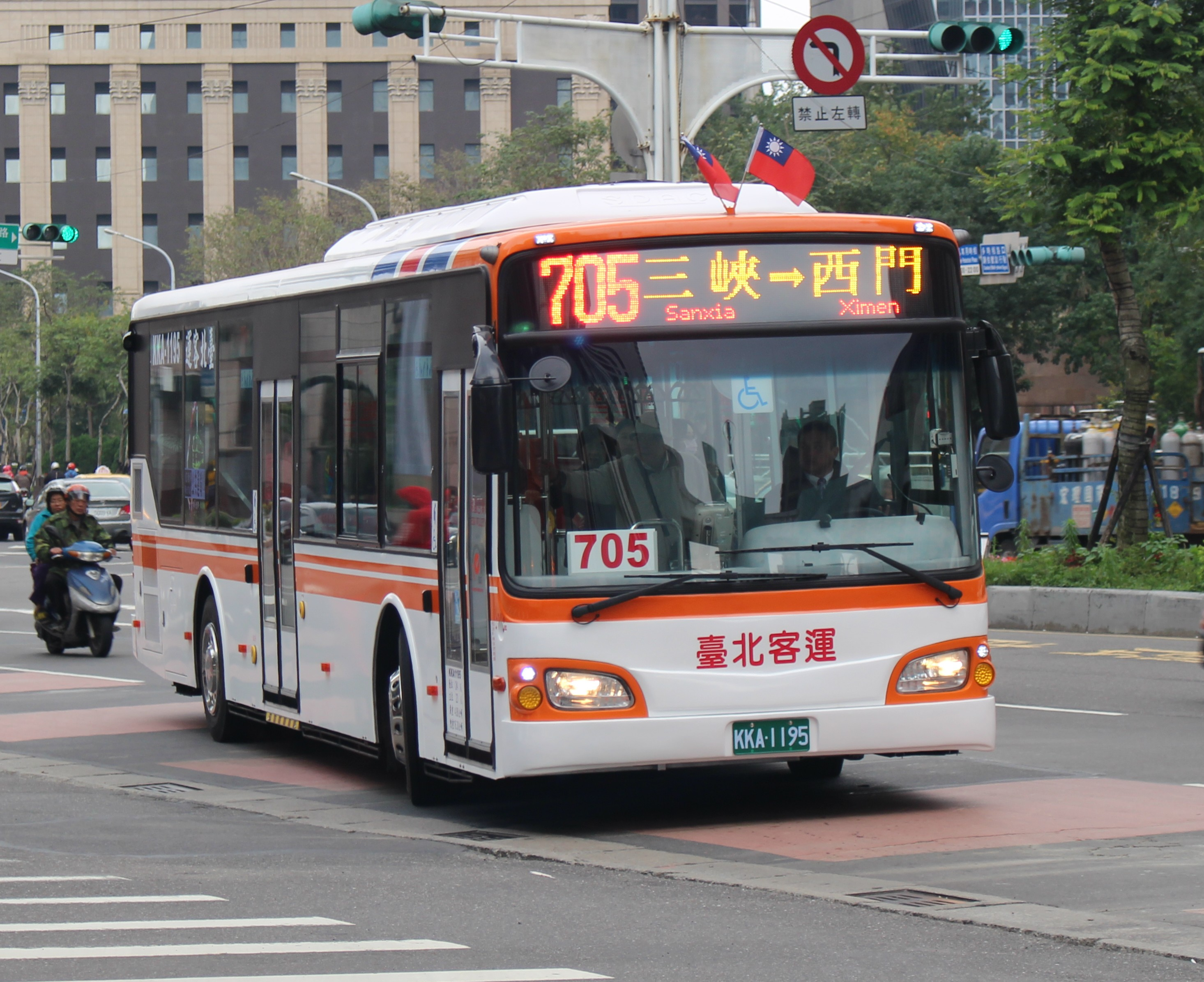 台北客運首批日野低地板KKA-1195